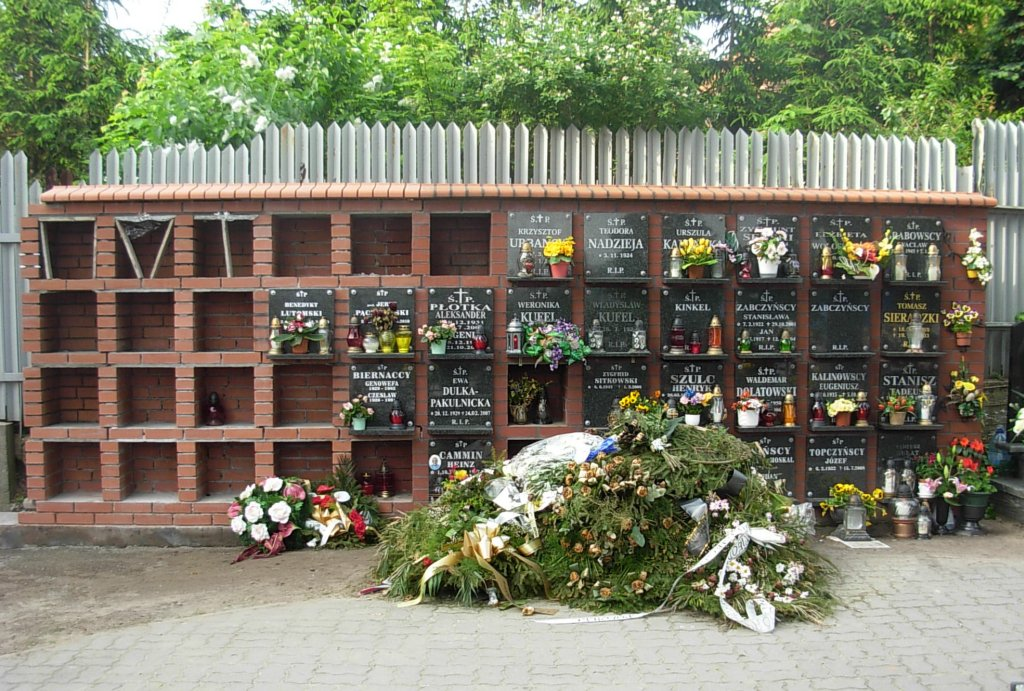 Cmentarz św. Józefa Bydgoszcz